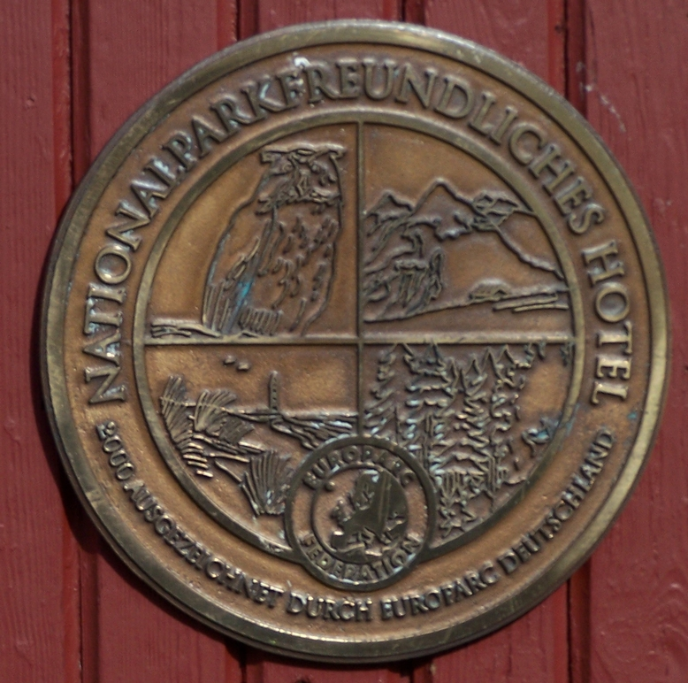 Qualitätssiegel, Plakette „Nationalparkfreundliches Hotel“ (von Europarc Deutschland)